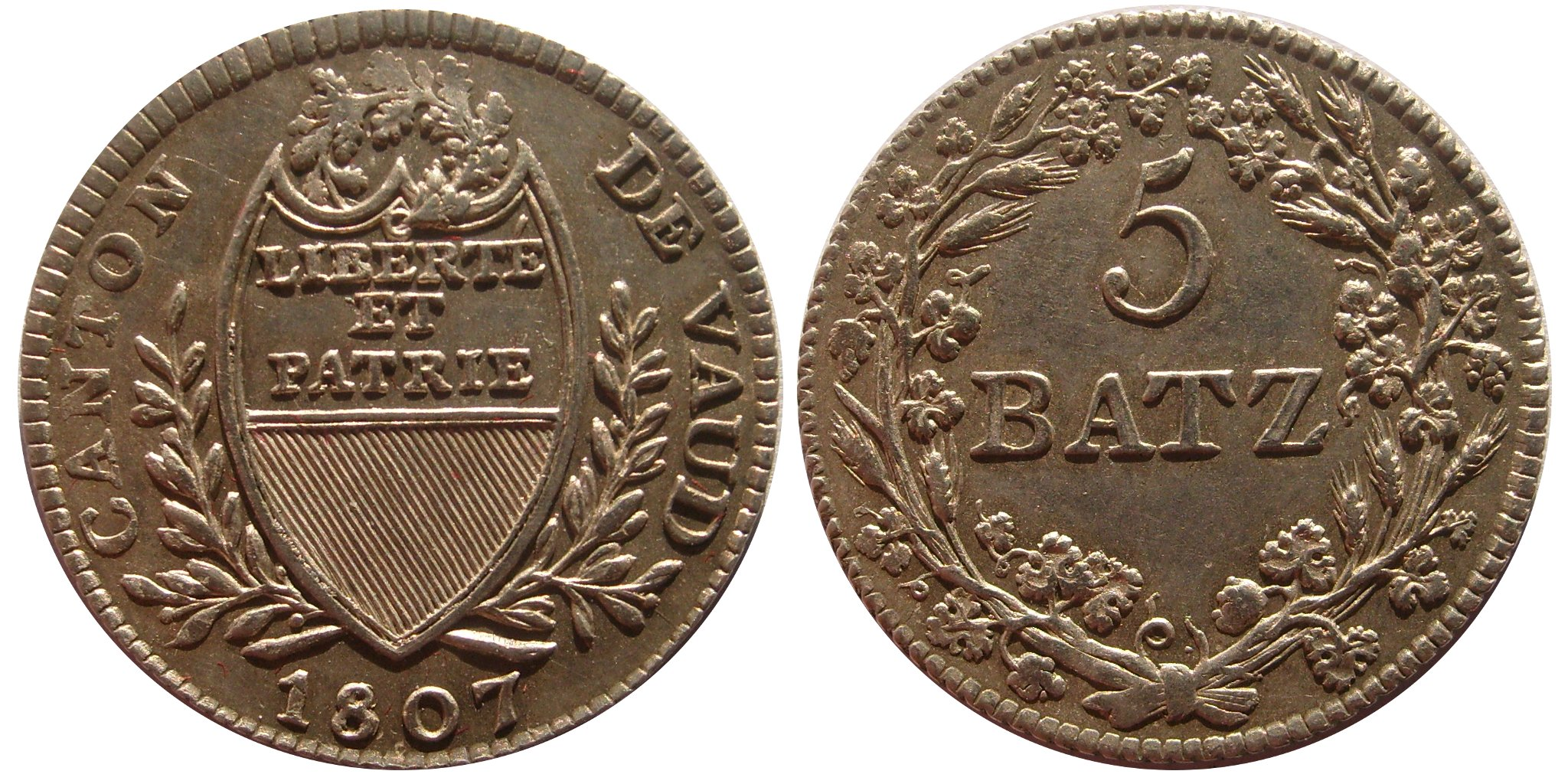 5 batz, Canton Vaud, 1807.